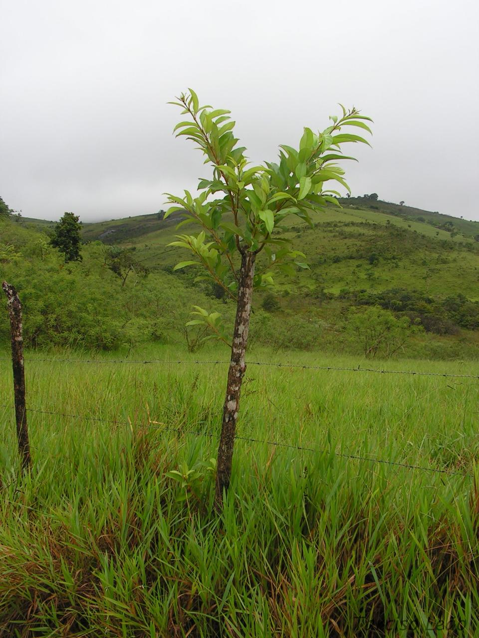 Verbenaceae – Citharexylum myrianthum Cham. – árvore pioneira – RPPN Pedra D'Anta, Serra do Urubu – Lagoa dos Gatos – Pernambuco – Brasil.